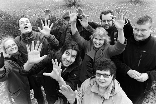 Teatteri Sokkelon näyttelijöitä